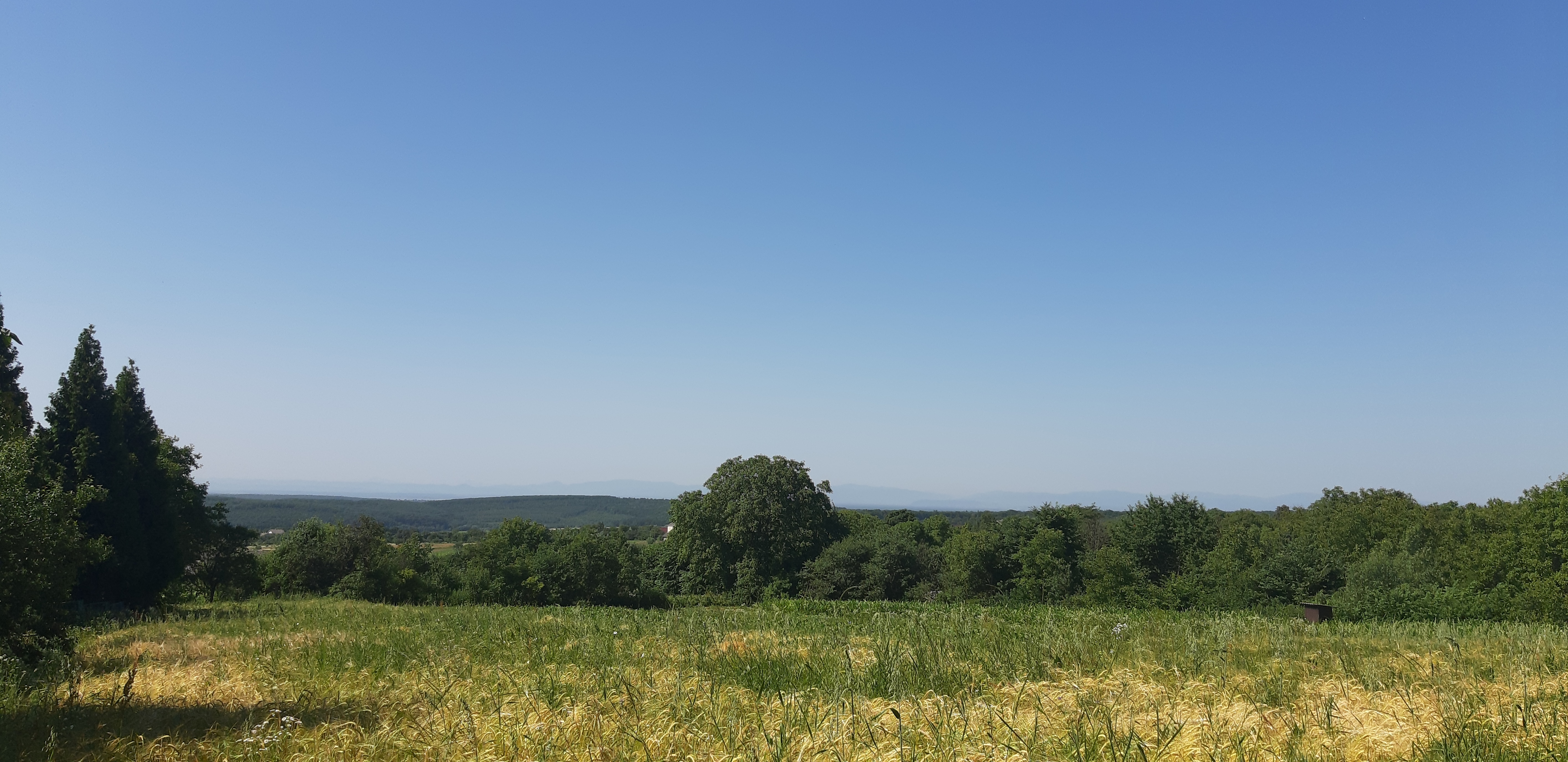 Пейзажний вигляд населеного пункту